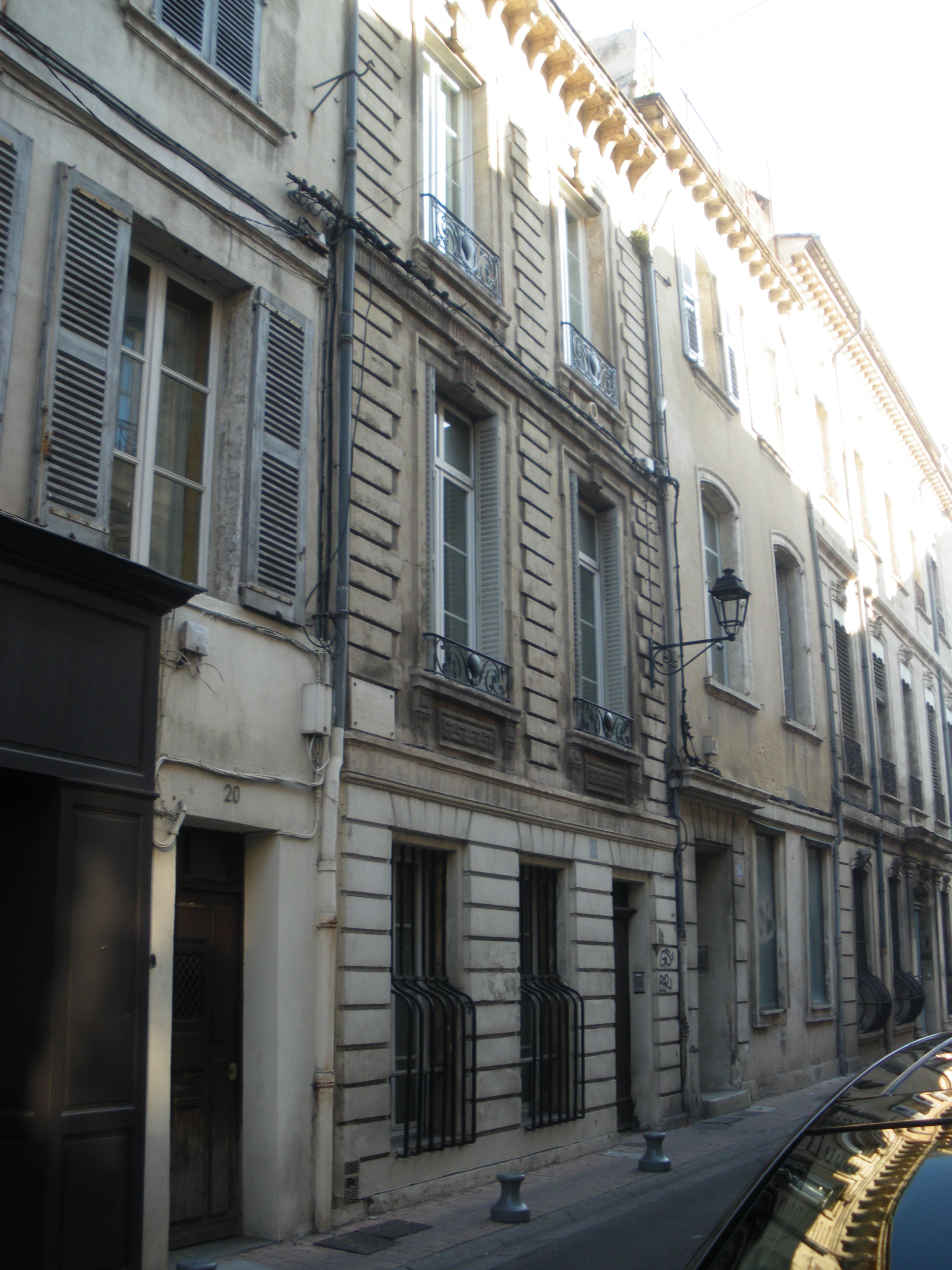 Maisons "aux Ballons", à Avignon : "En Novembre 1782, Joseph de Mongolfier découvrit dans cette le principe de l'aérostation"